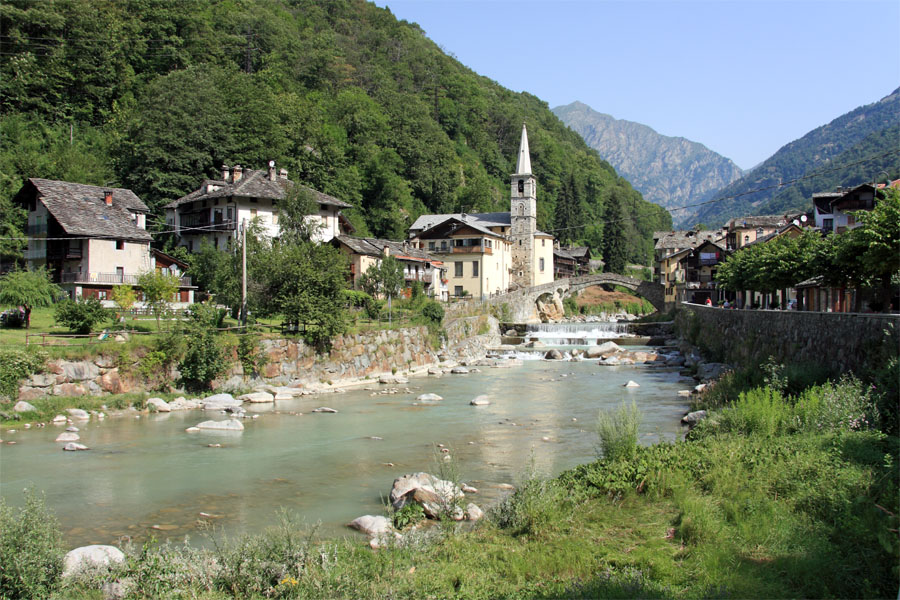 Veduta di Fontainemore